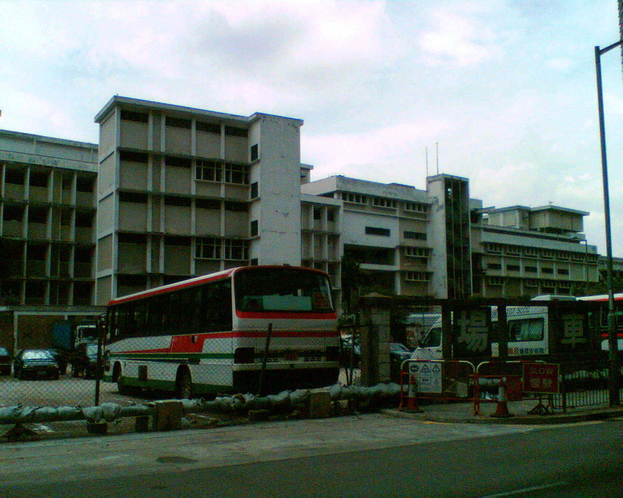 堅尼地城屠房（自拍照片 2006.05.25）